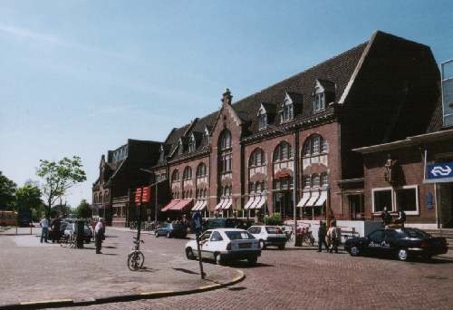 Station Roosendaal